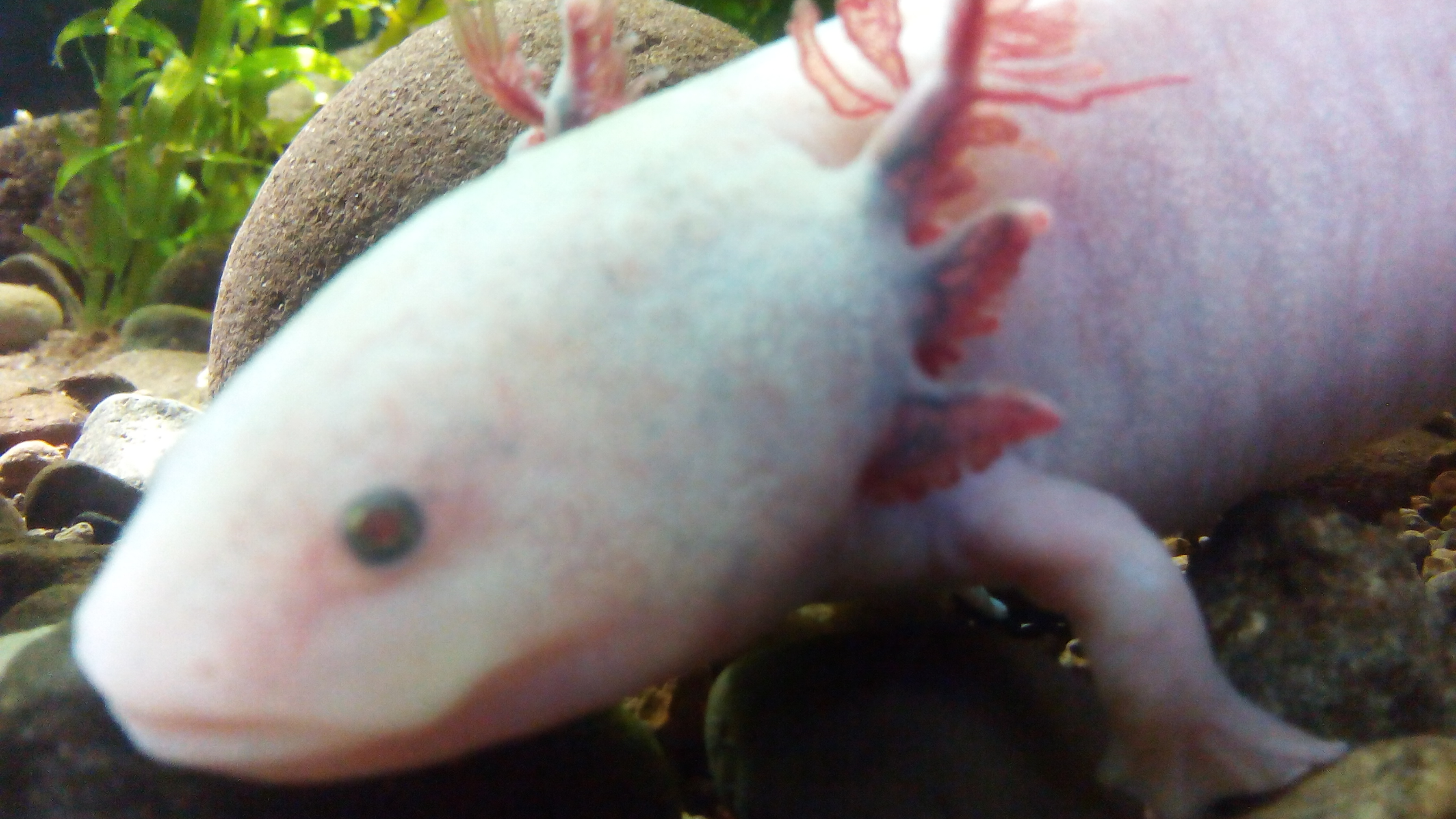 Ajolote albino en cautiverio en Acuario Michin, tiene los ojos y las branquias rojos.